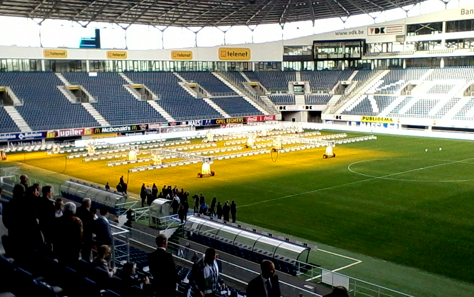 Ghelamco Arena, voetbalstadion KAA Gent, België